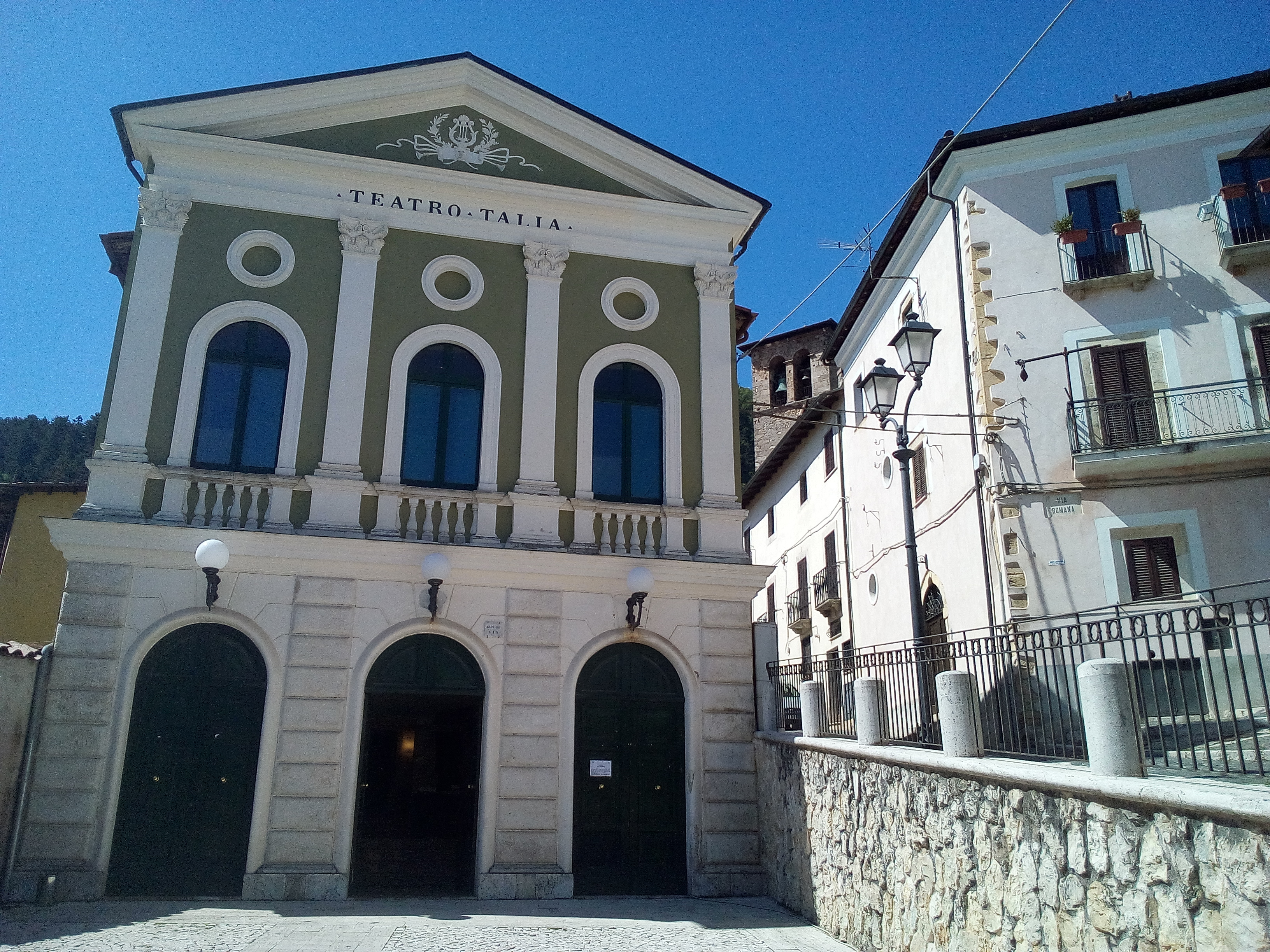 Facciata del teatro